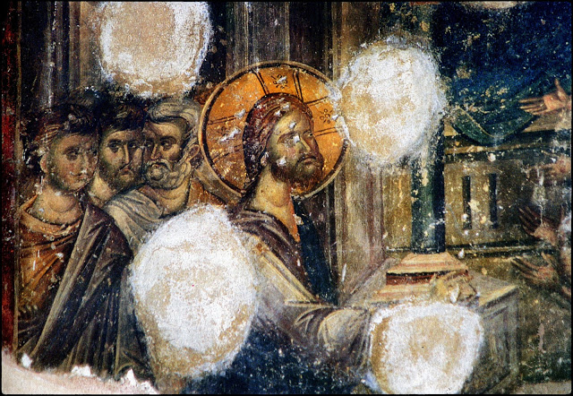 Mvskoke: Αγία Αικατερίνη Θεσσαλονίκης. Λεπτομέρεια από την παράσταση της ίασης των λεπρών, 1315-1320